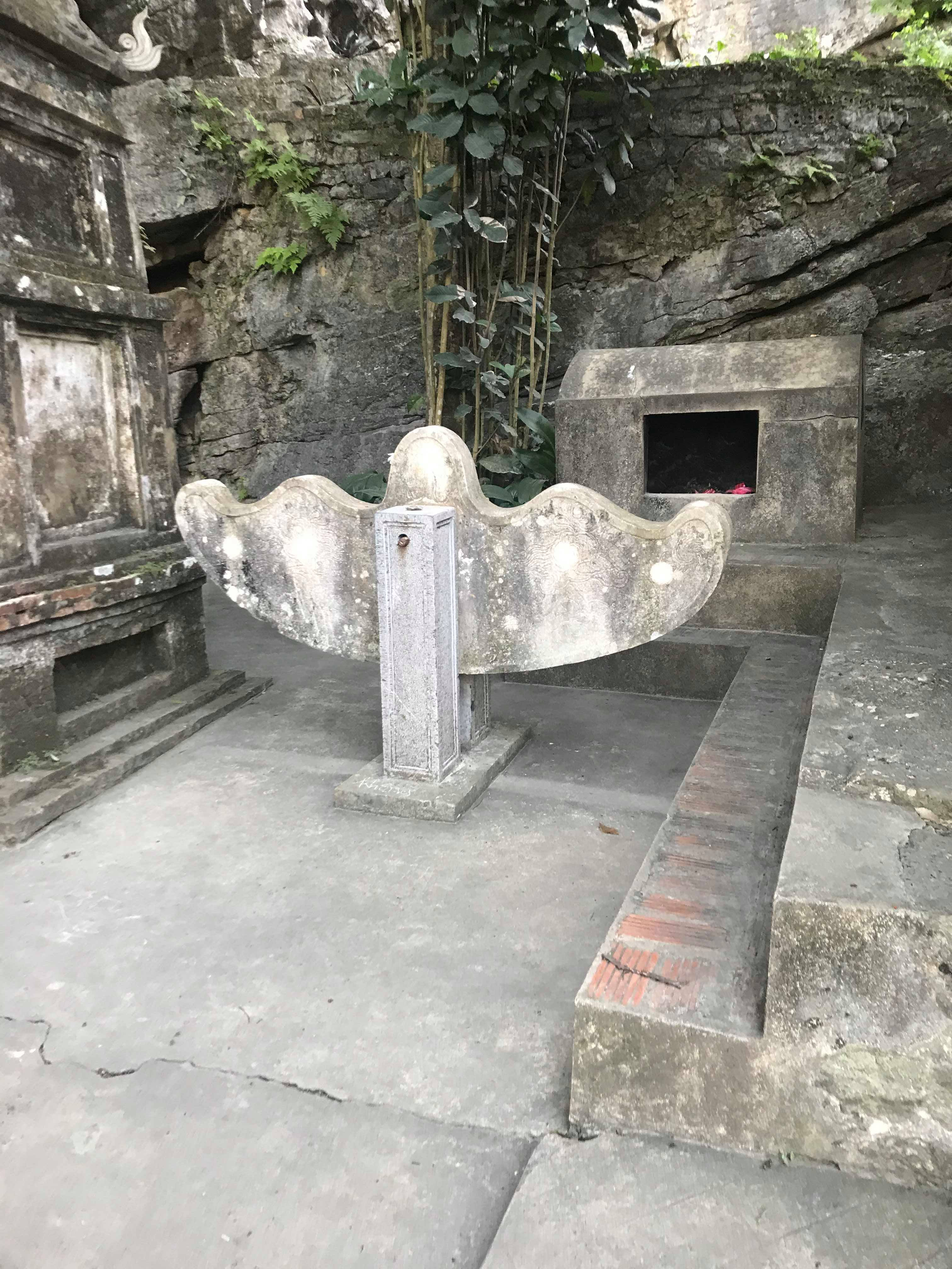 Vật dụng đá kì lạ này nhìn như một chiếc bập bênh vậy!!